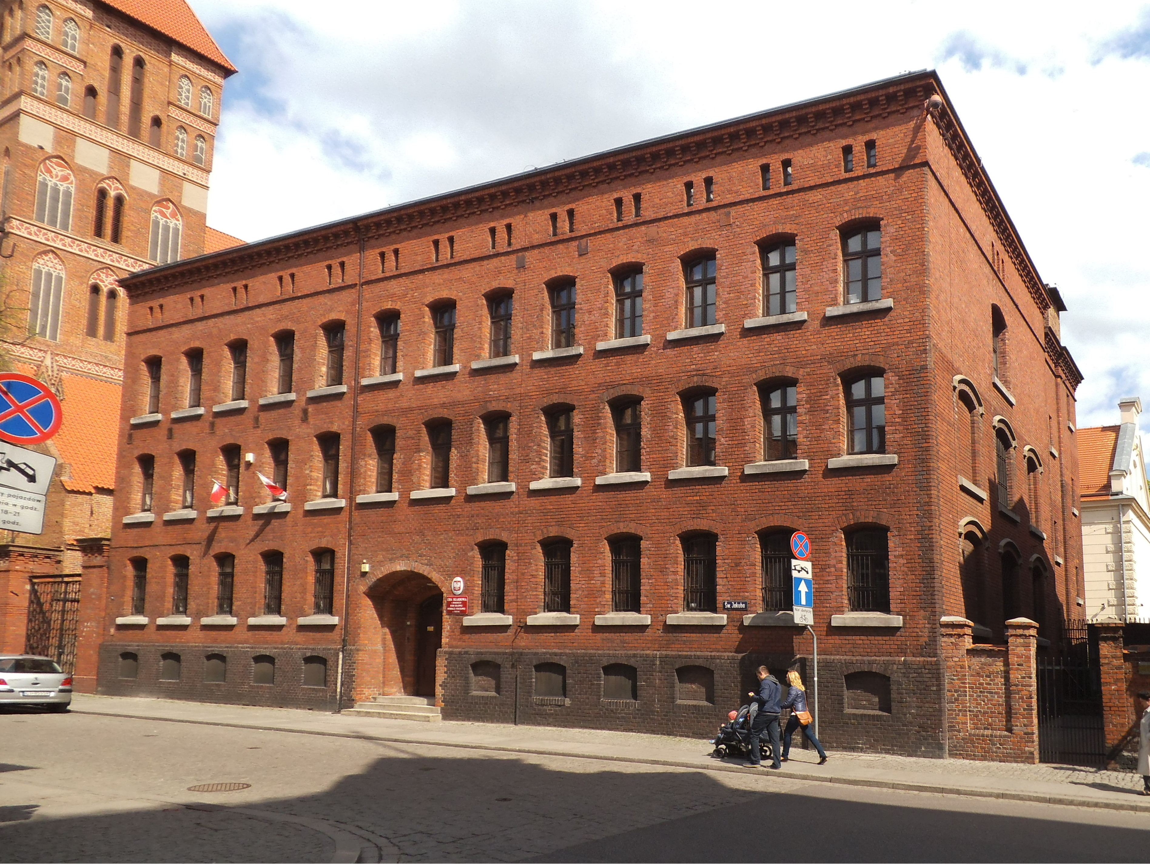 Biuro Krajowej Informacji Podatkowej w Toruniu